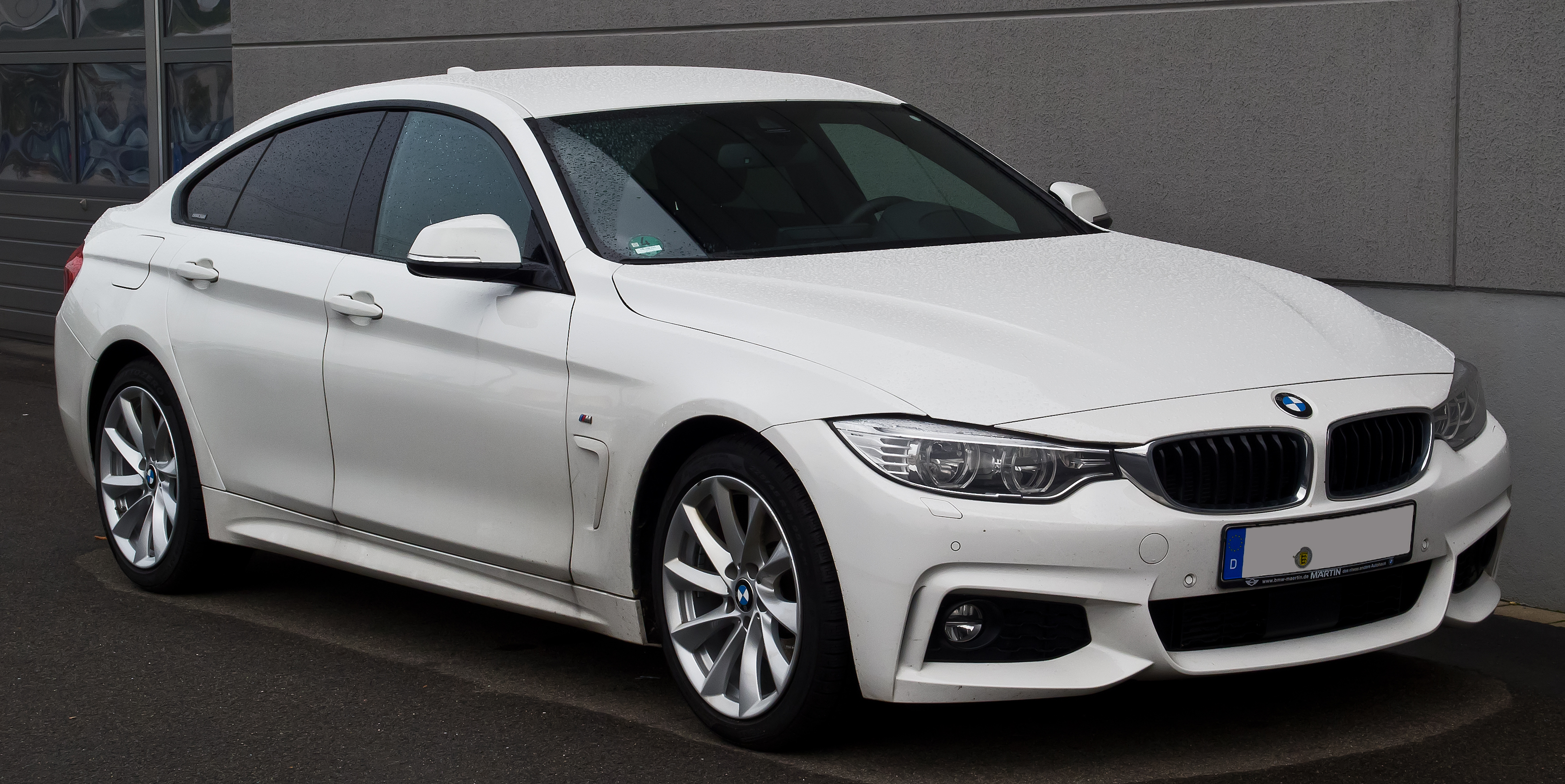 BMW 430d Gran Coupé M Sport (F36)